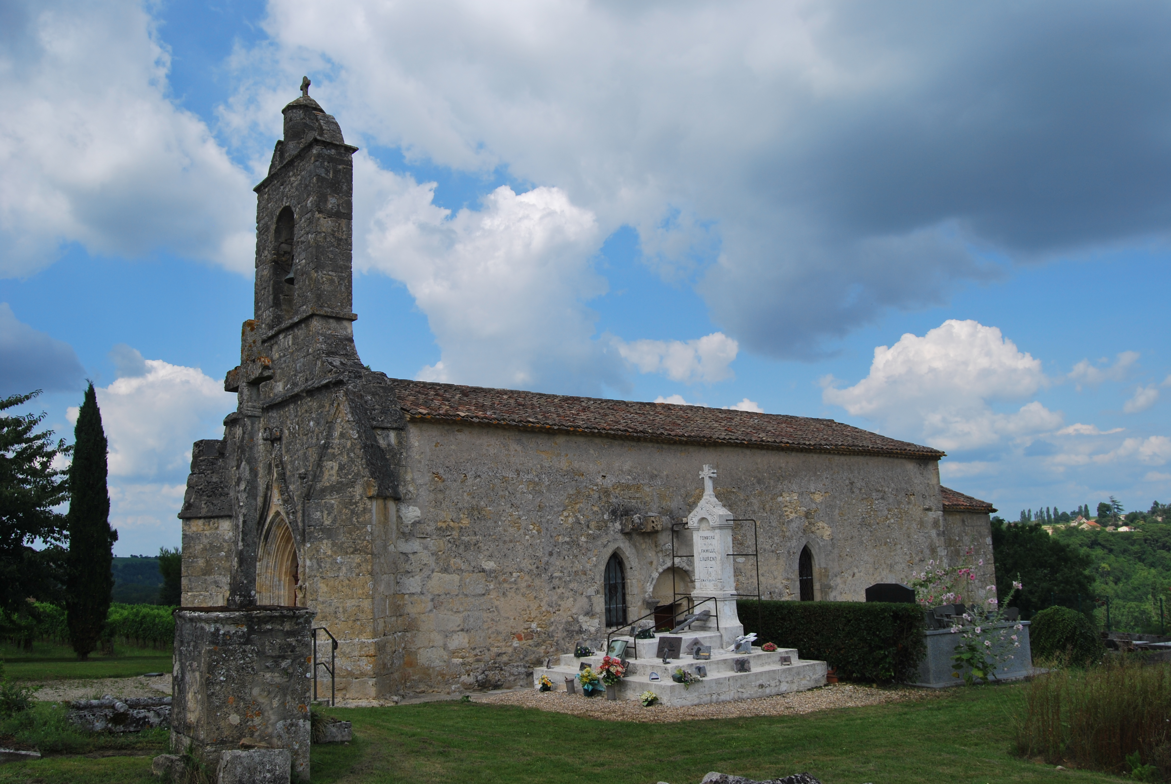 Église Saint-Philippe de Coubeyrac